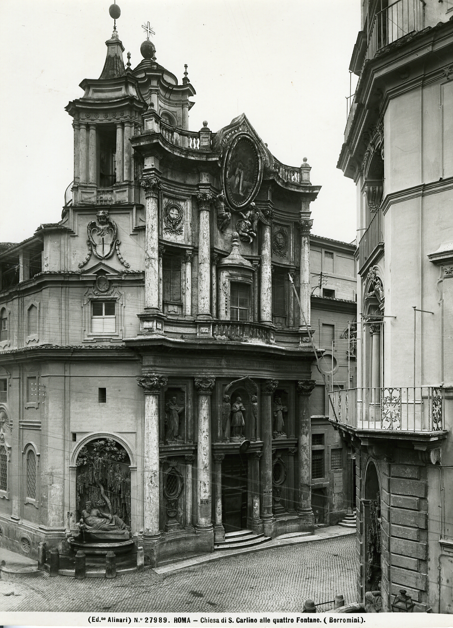 Roma. Vedute esterne della Chiesa di Sant'Andrea della Valle e della Chiesa di San Carlino alle Quattro Fontane. Servizio fotografico : Spoleto, 1950 / Fratelli Alinari. - Stampe: 2 : Positivo b/n, gelatina bromuro d'argento/ carta, 18x24. - ((Al recto iscrizione fotografica: "47284 Roma - Chiesa di S. Andrea della Valle: Facciata (su dis. del Maderno, modific. da C. Rainaldi, 1665)/ F.lli Alinari Firenze 1938" e "(Ed.ne Alinari) N°27989. Roma - Chiesa di S. Carlino alle Quattro Fontane (Borromini). Sul coperchio della scatola iscrizione manoscritta a pennarello: "Chiese medioevali"